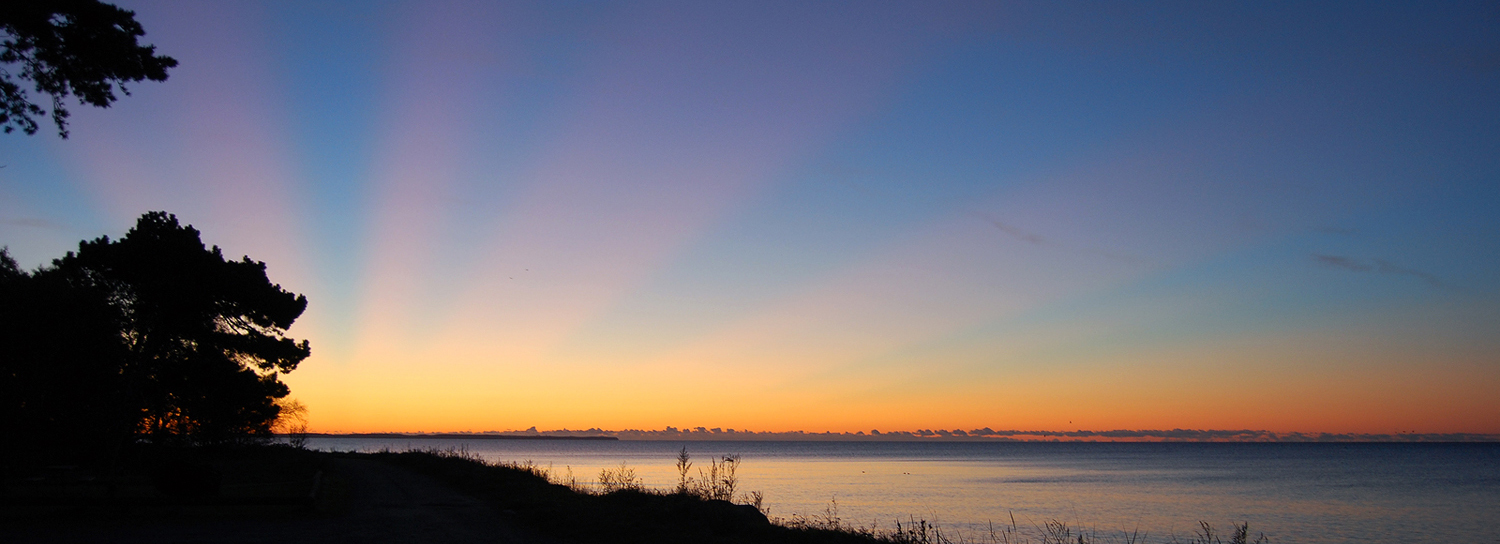 Morgonrodnad 9 oktober 2011 vid Världens ände Ystad.